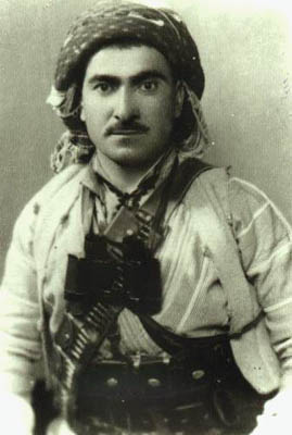 Молодой Барзани эпохи восстания 1931-32 гг.